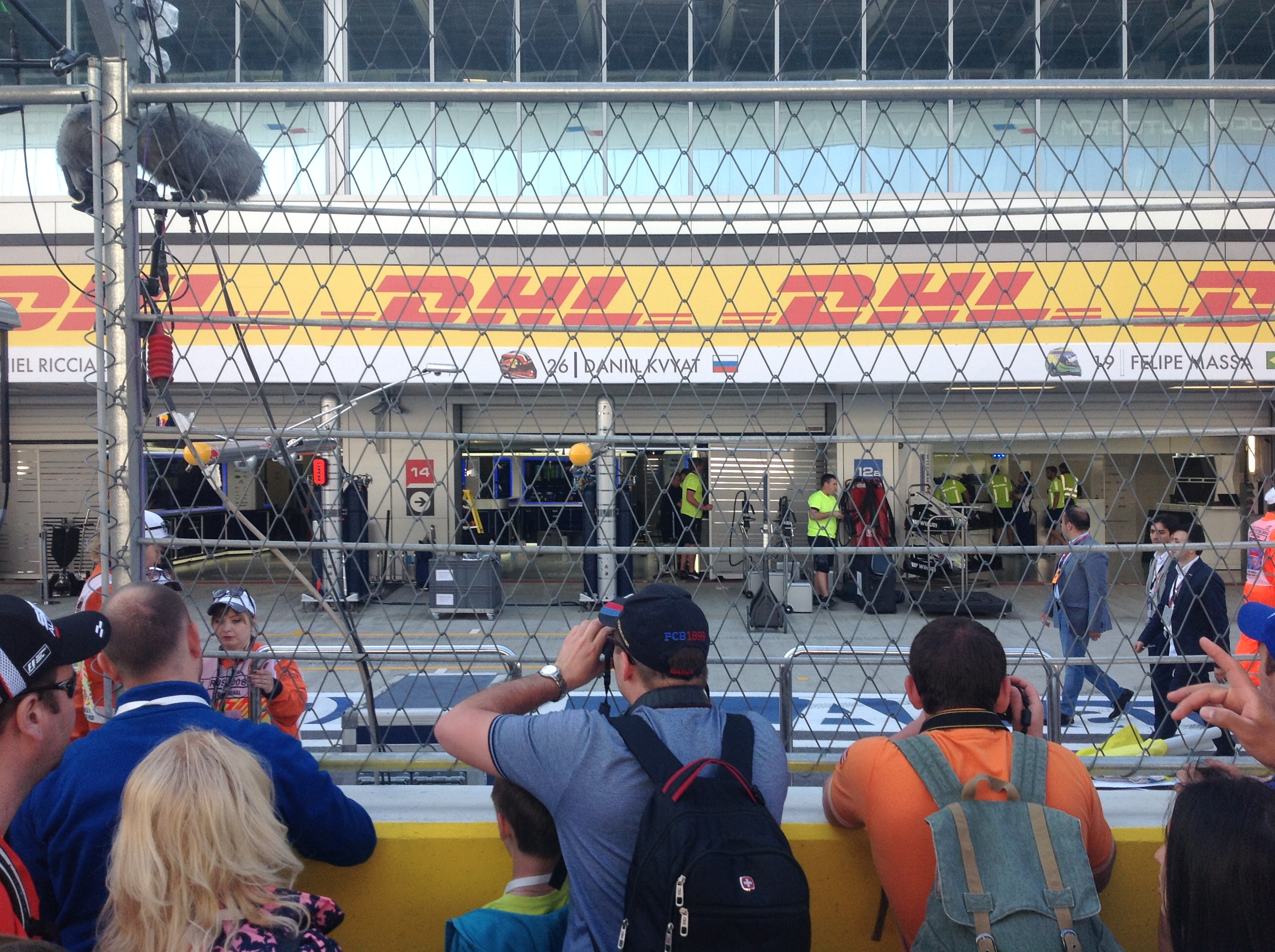 Бокс Даниила Квята на Гран-при России в Сочи